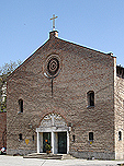 Himmelfahrtskirche Sendling, Foto: Kai Kappel